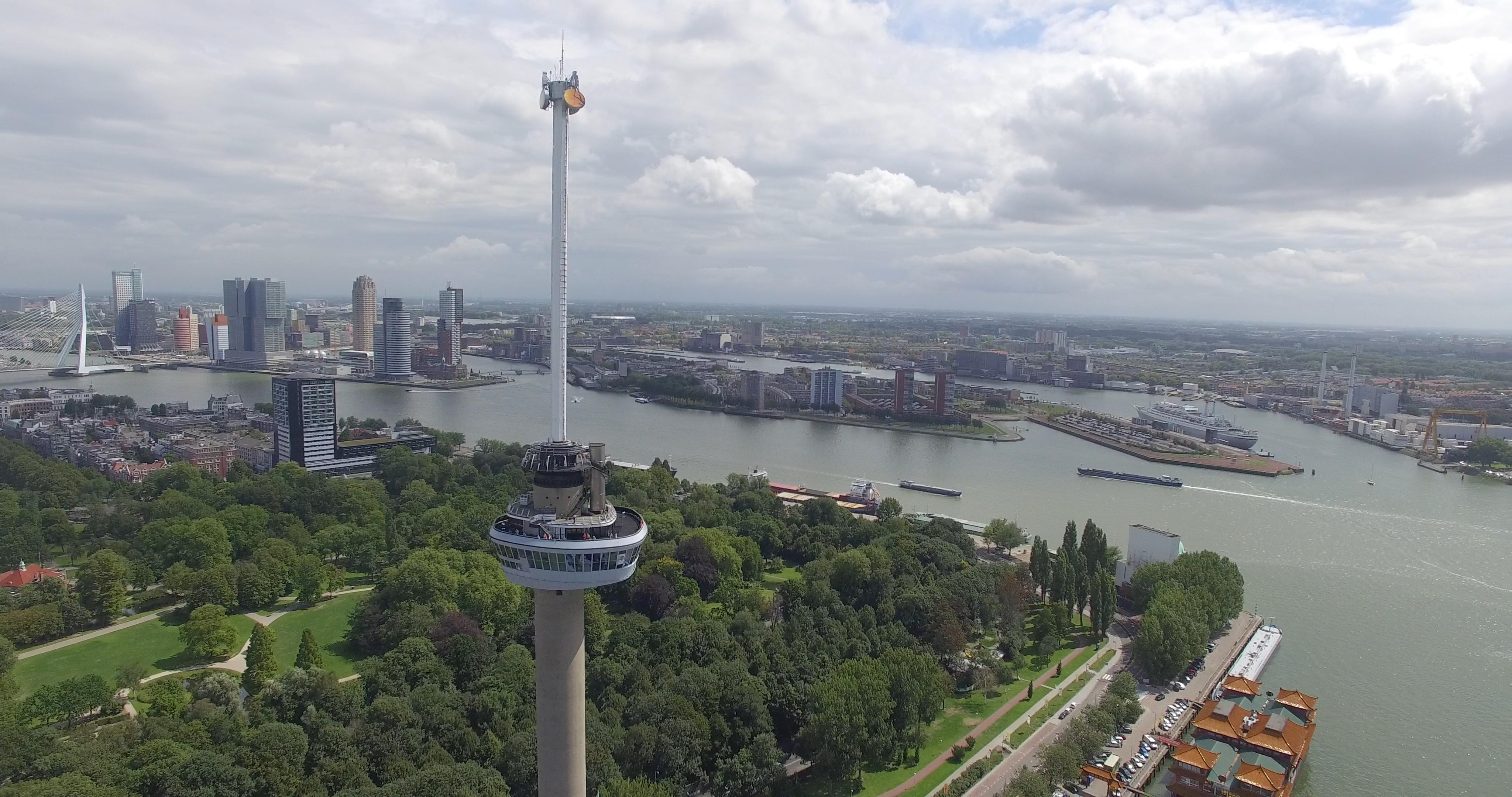 Euromast